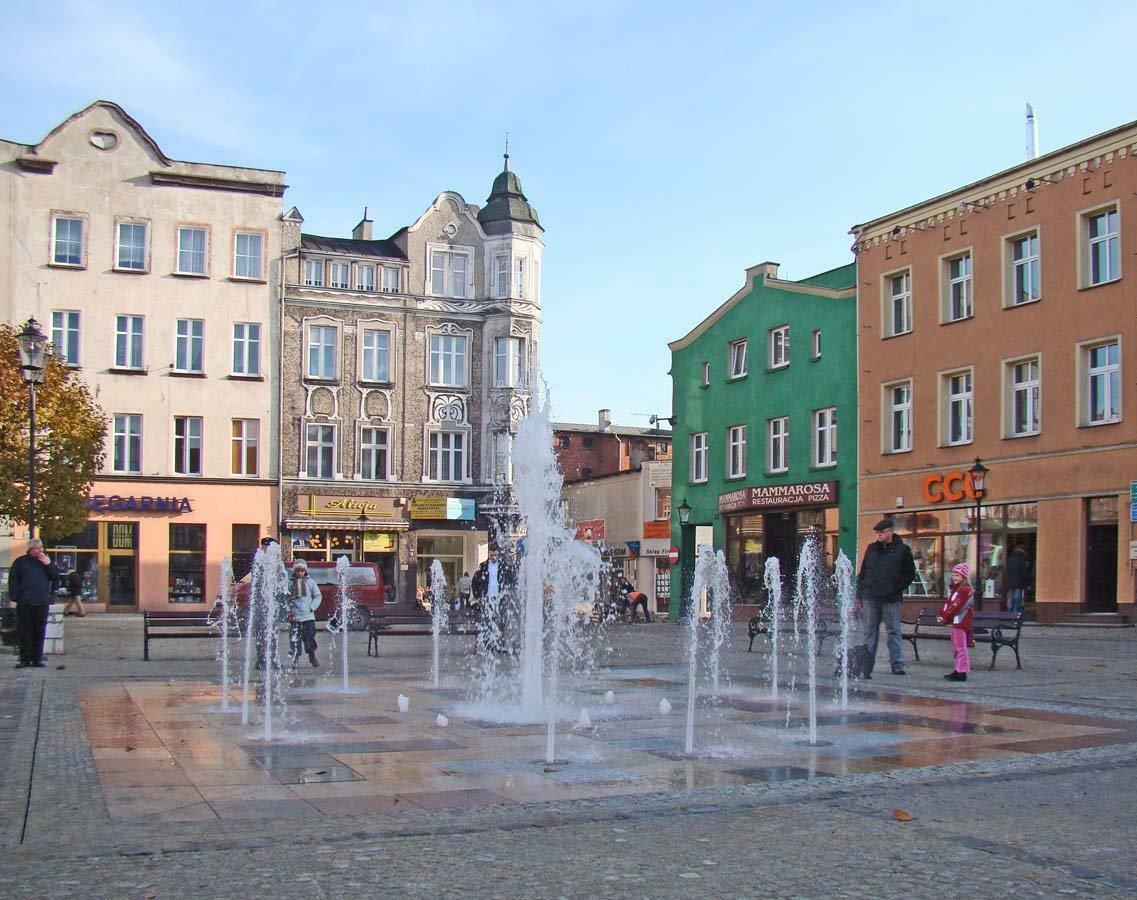 Fontanna "podłogowa" na rynku kościerskim.